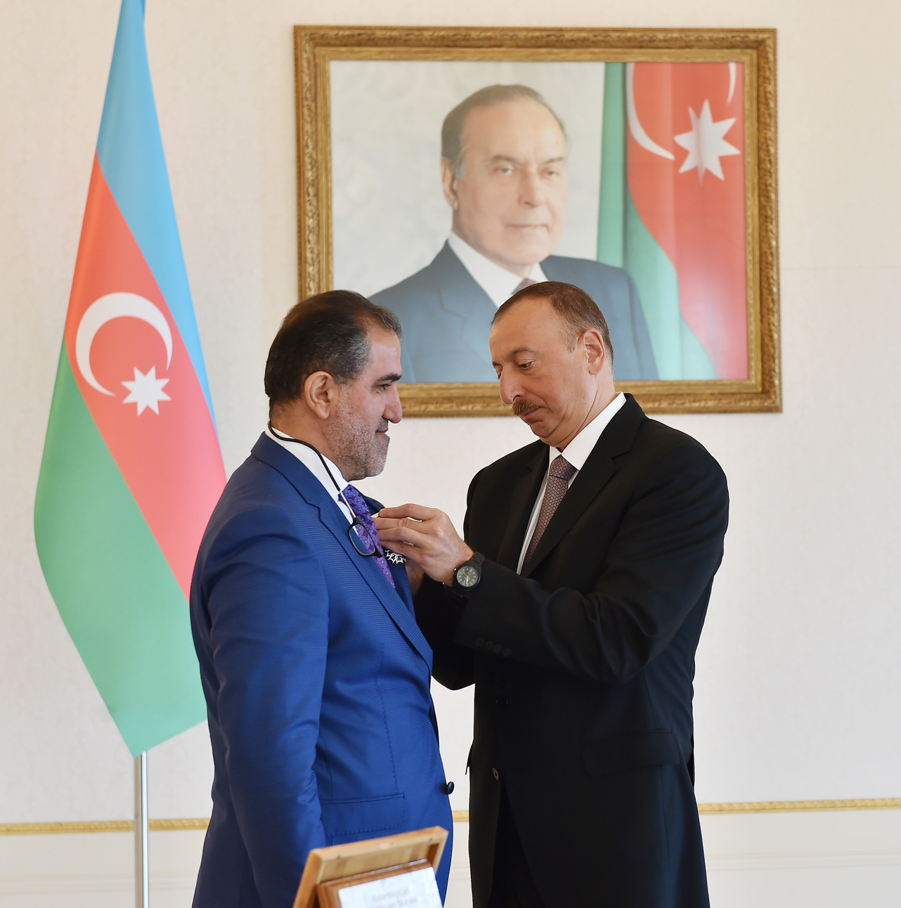 lham Əliyev milli mətbuatın yaradılmasının 140 illiyi münasibətilə Mətbuat Şurasının İdarə Heyətinin üzvləri ilə görüşərkən